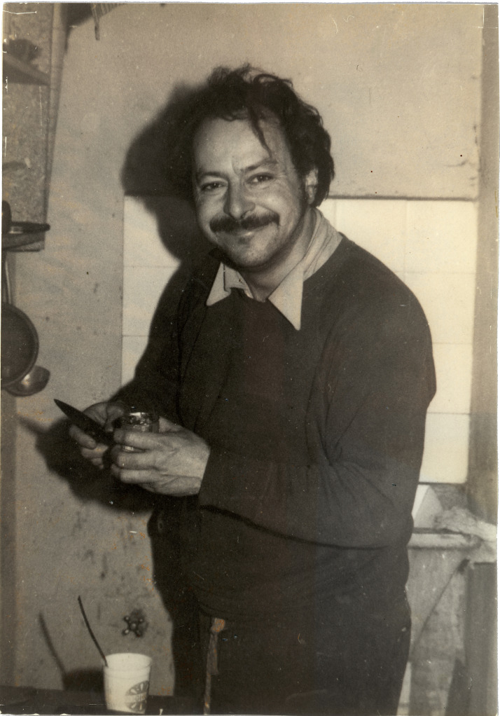 Fotografía de Ary Cabrera Prates de mi propiedad Adriana Cabrera Esteve